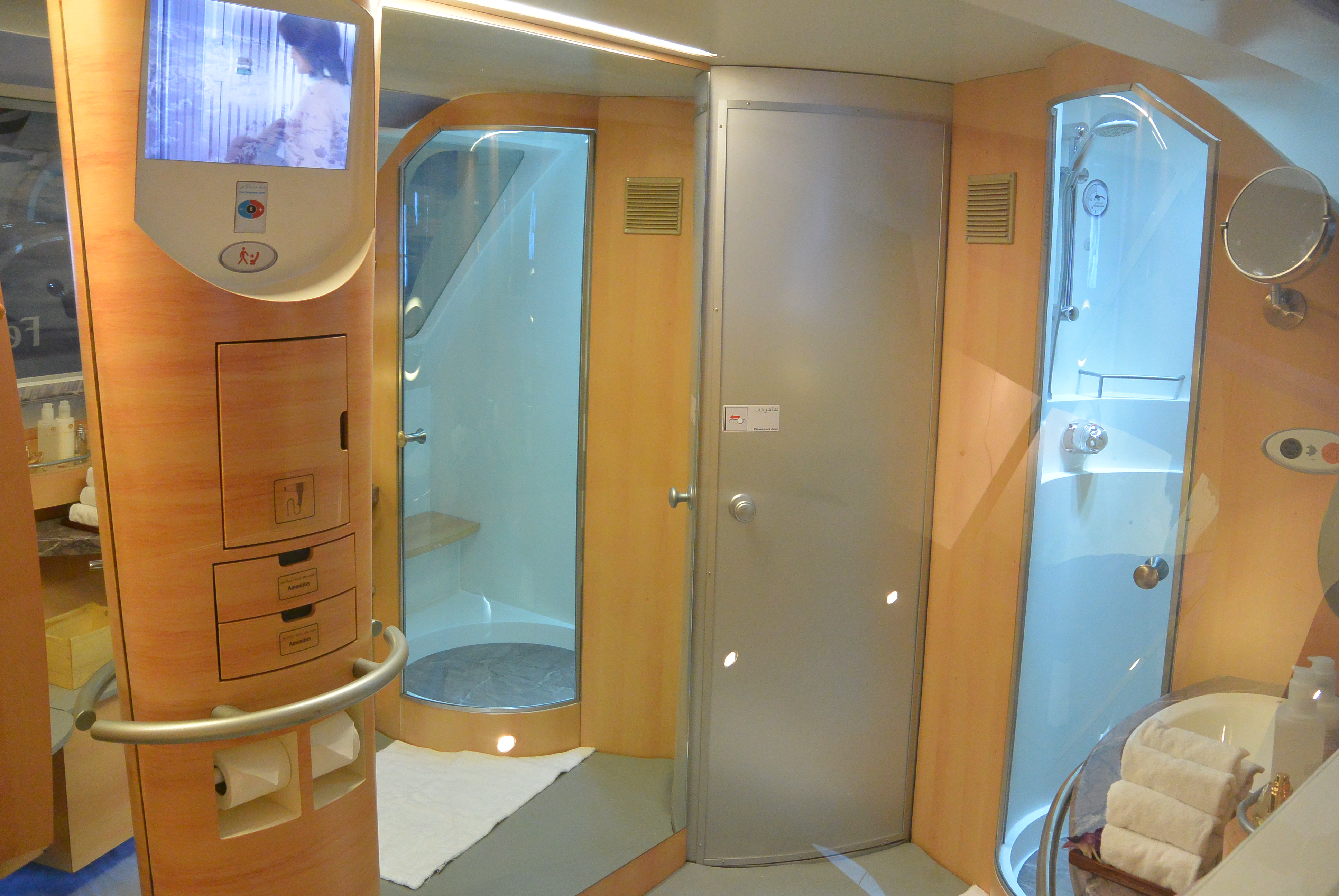 Luksusowa łazienka w samolocie Airbus A380 linii Emirates podczas ITB Berlin 2014.